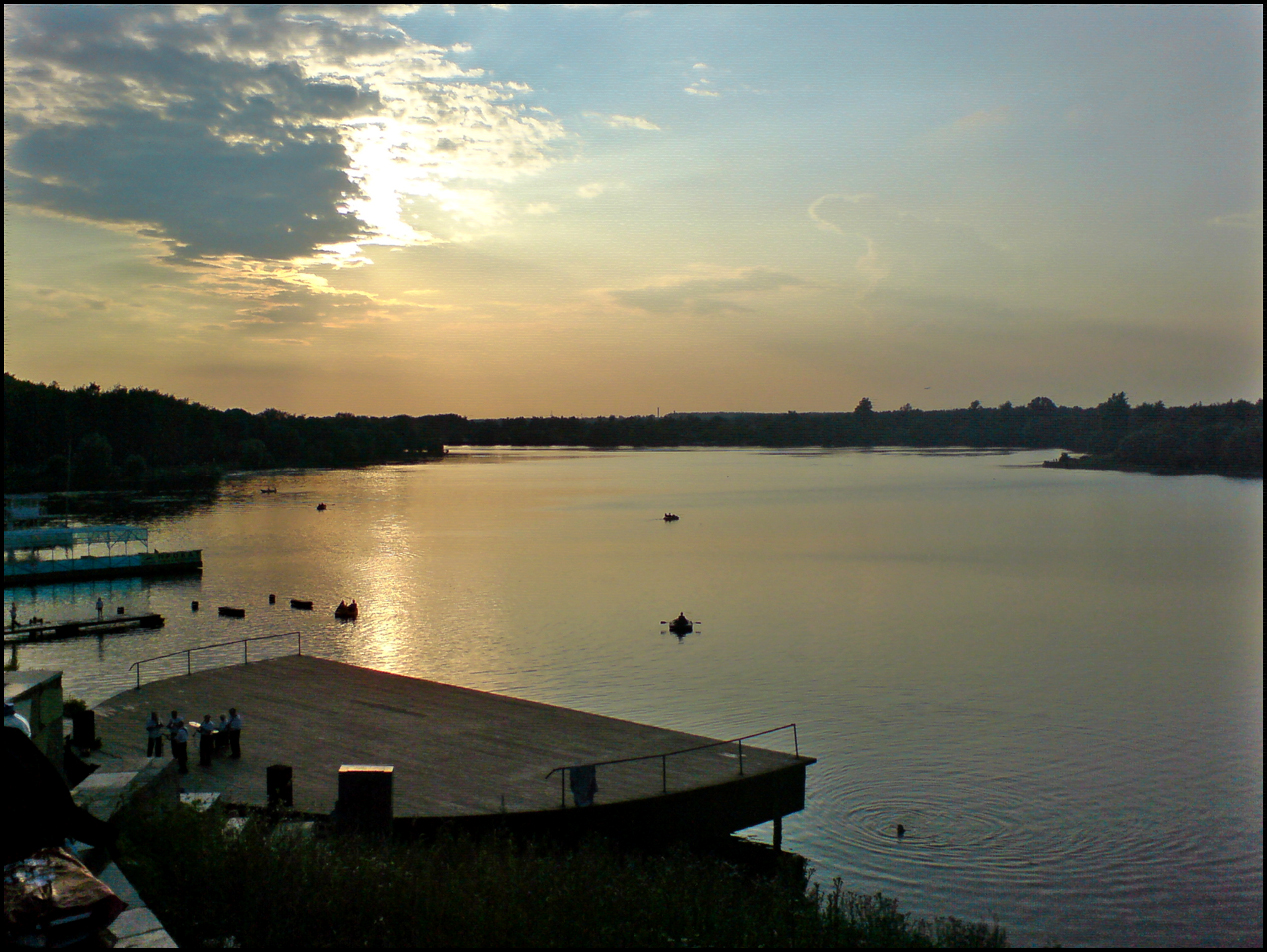 Долгопрудный. Котовский залив